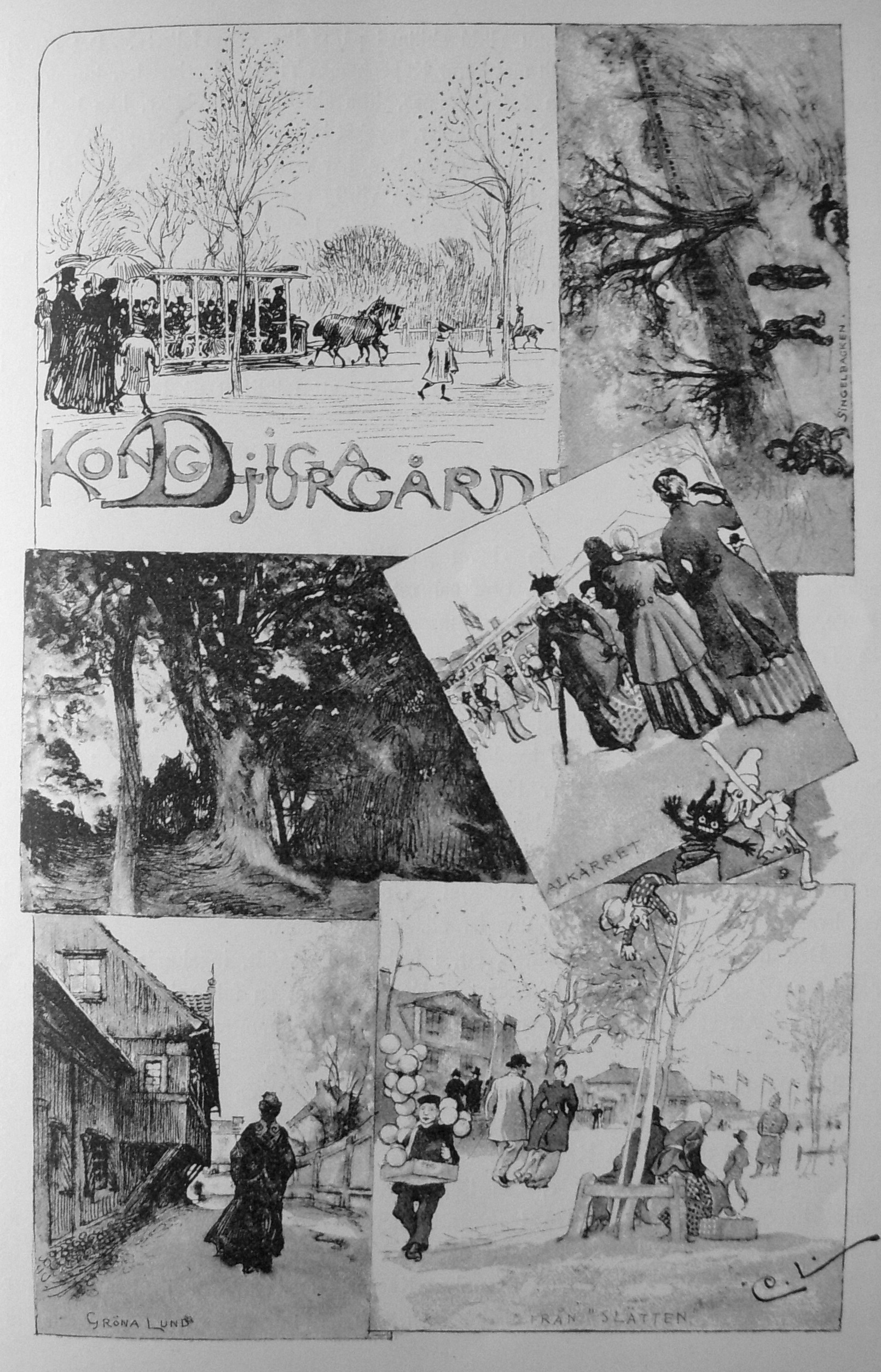 Bildkollage "Kongliga Djurgården"